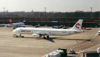 Maschine der Aero Lloyd auf dem Flughafen Berlin-Tegel